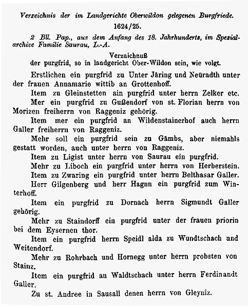 Liste der Burgfriede im Sprengel des Landgerichtes Oberwildon im Jahr 1625